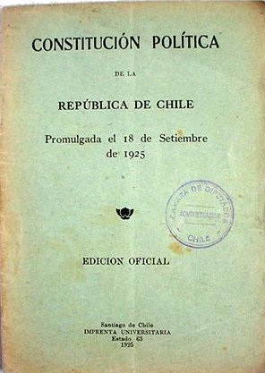 Portada de un ejemplar de la Constitución de la República de Chile de 1925. Santiago: Editorial Universitaria, 1925.